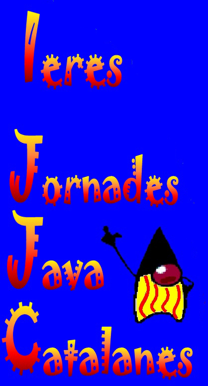 Logo del cartell de les 1eres Jornades Java Catalanes